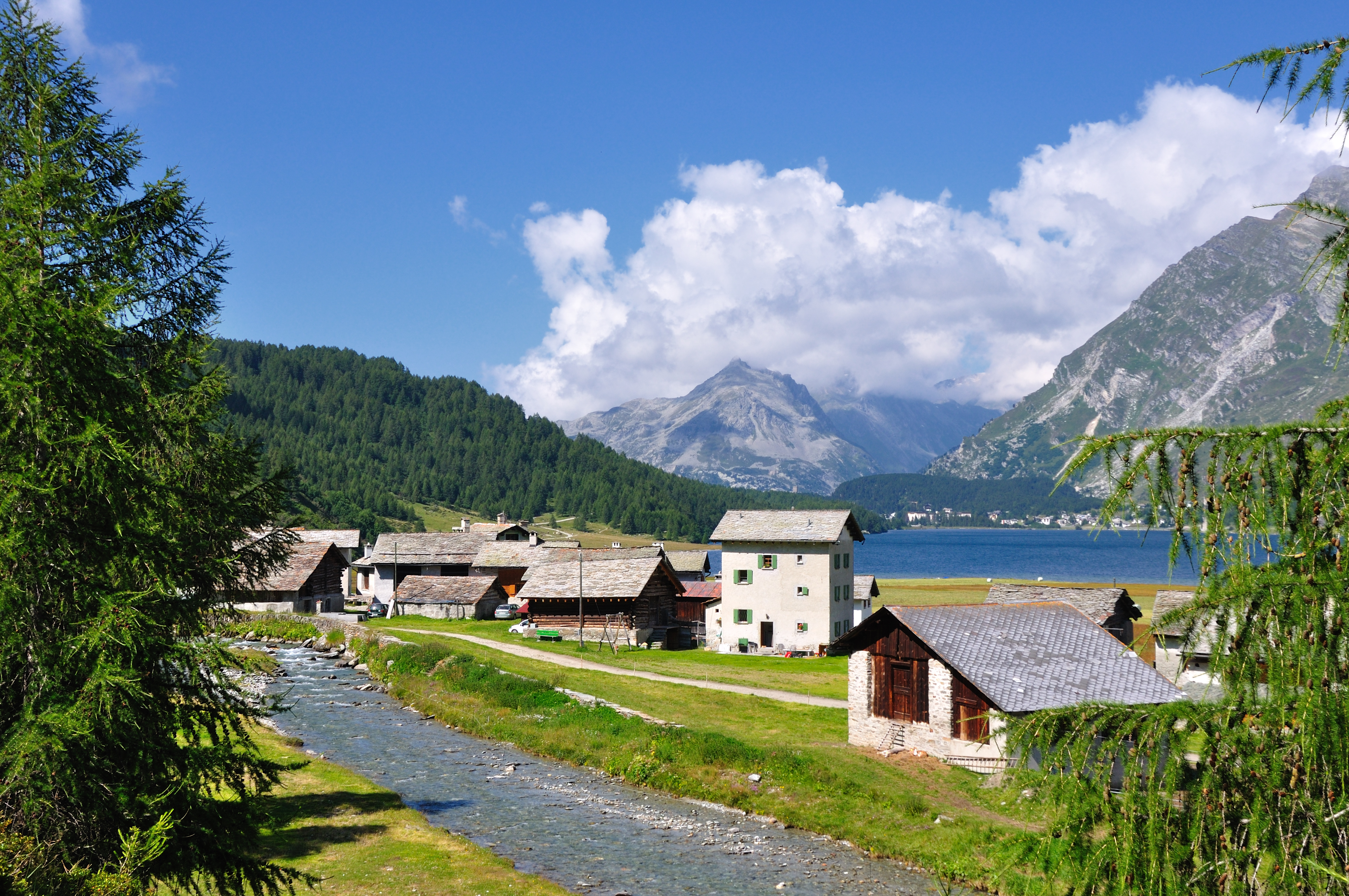 Switzerland, Graubünden, walk along Lake Sils